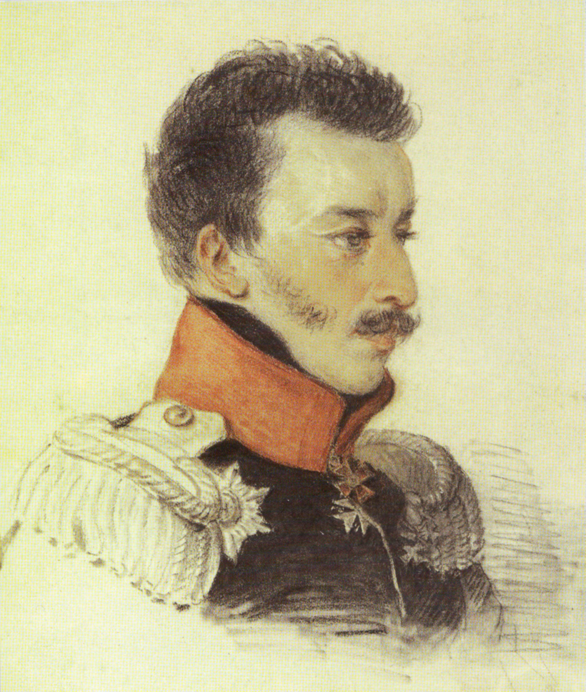 Соколов Петр Федорович. Портрет Волконского Сергея Григорьевича. Конец 1816-начало 1817 г